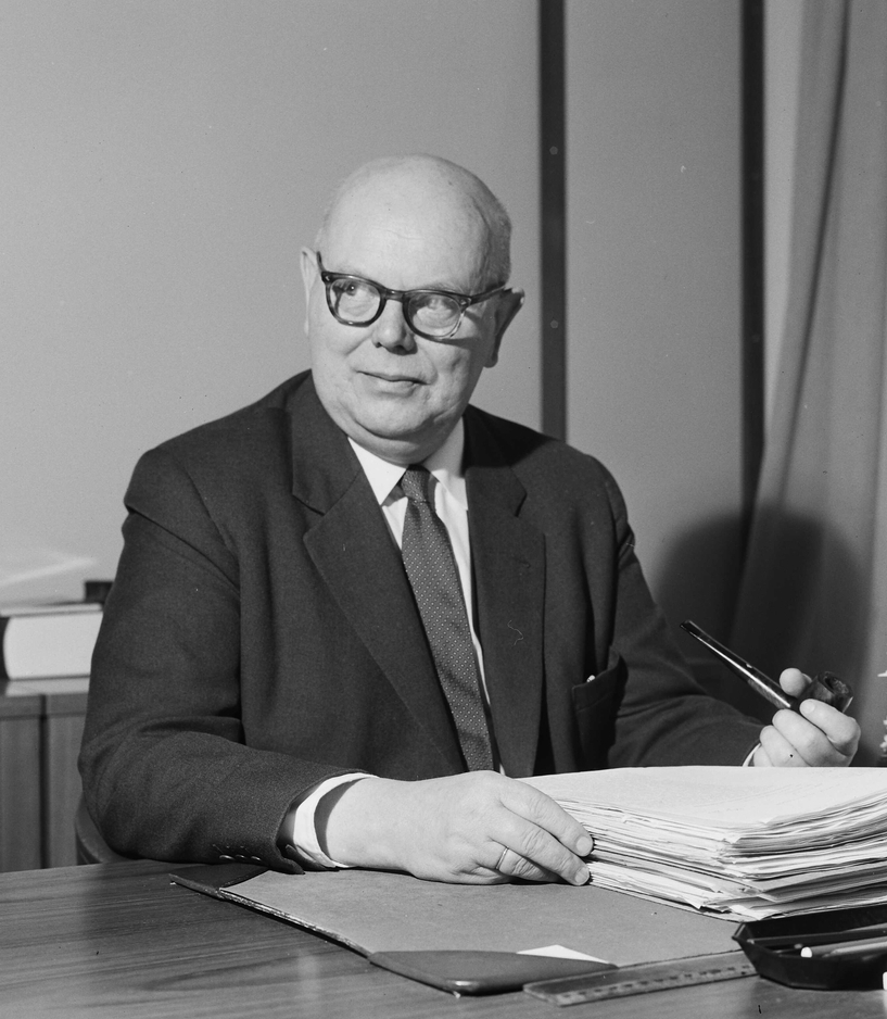 Telegrafdirektør Leif Larsen